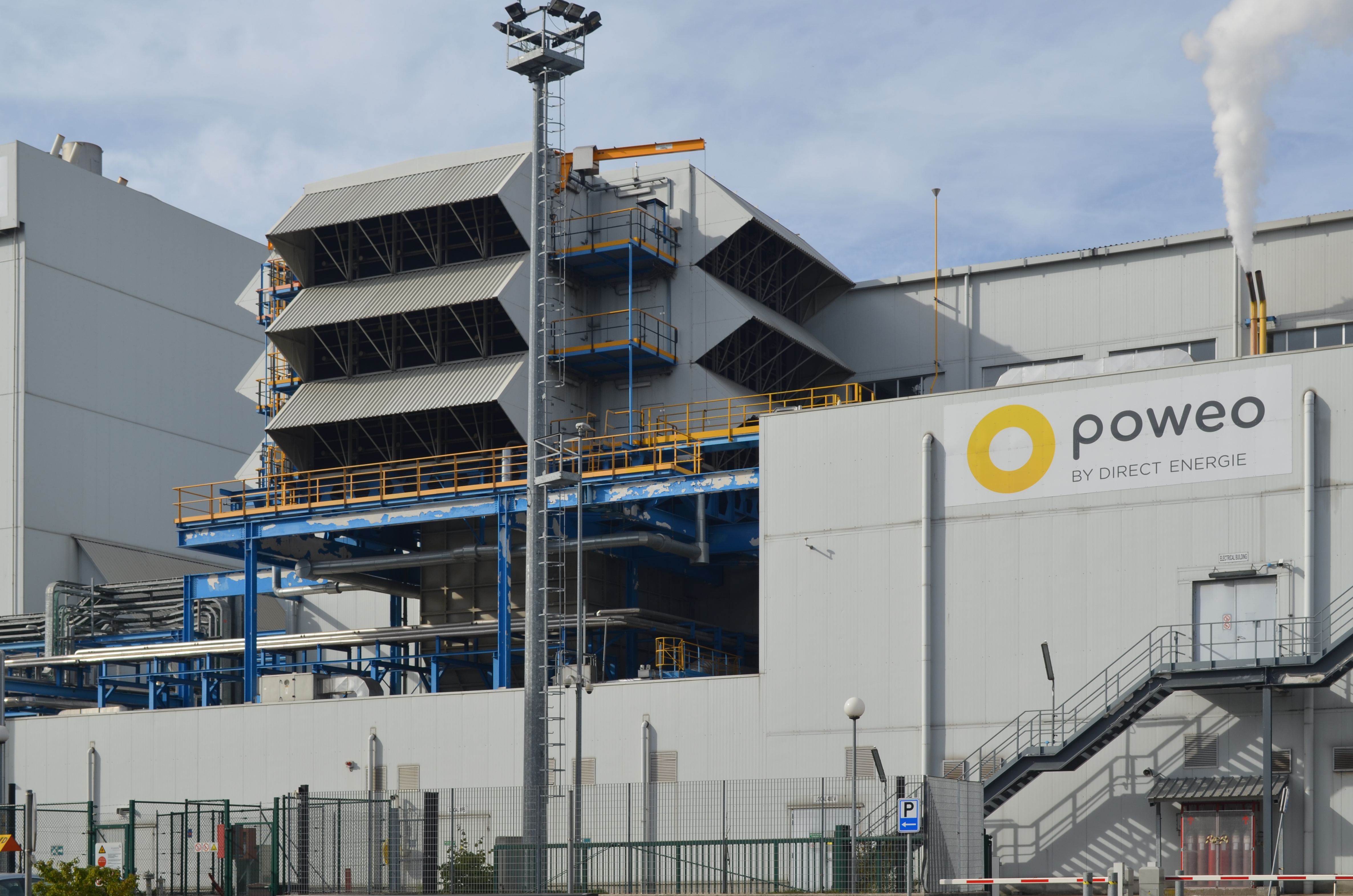 Marchienne-au-Pont (Charleroi-Belgique) - Centrale énergétique Poweo-Direct Énergie.